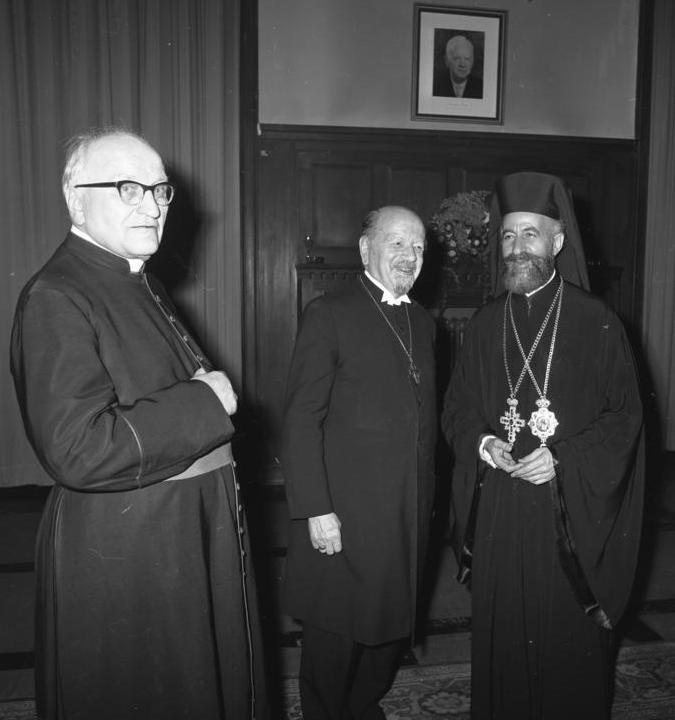 Staatsbesuch Zypern - West-Berlin Empfang Schöneberger Rathaus + Evangel. Bischof D. Dr. Dibelius, Berlin-Dahlem